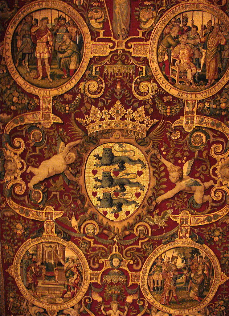 Himlen fra Frederik II af Danmark og Norges bordhimmel, Kronborg Slot, Sjælland. Udlånt i perioden 2012-16 fra Nationalmuseet i Stockholm.